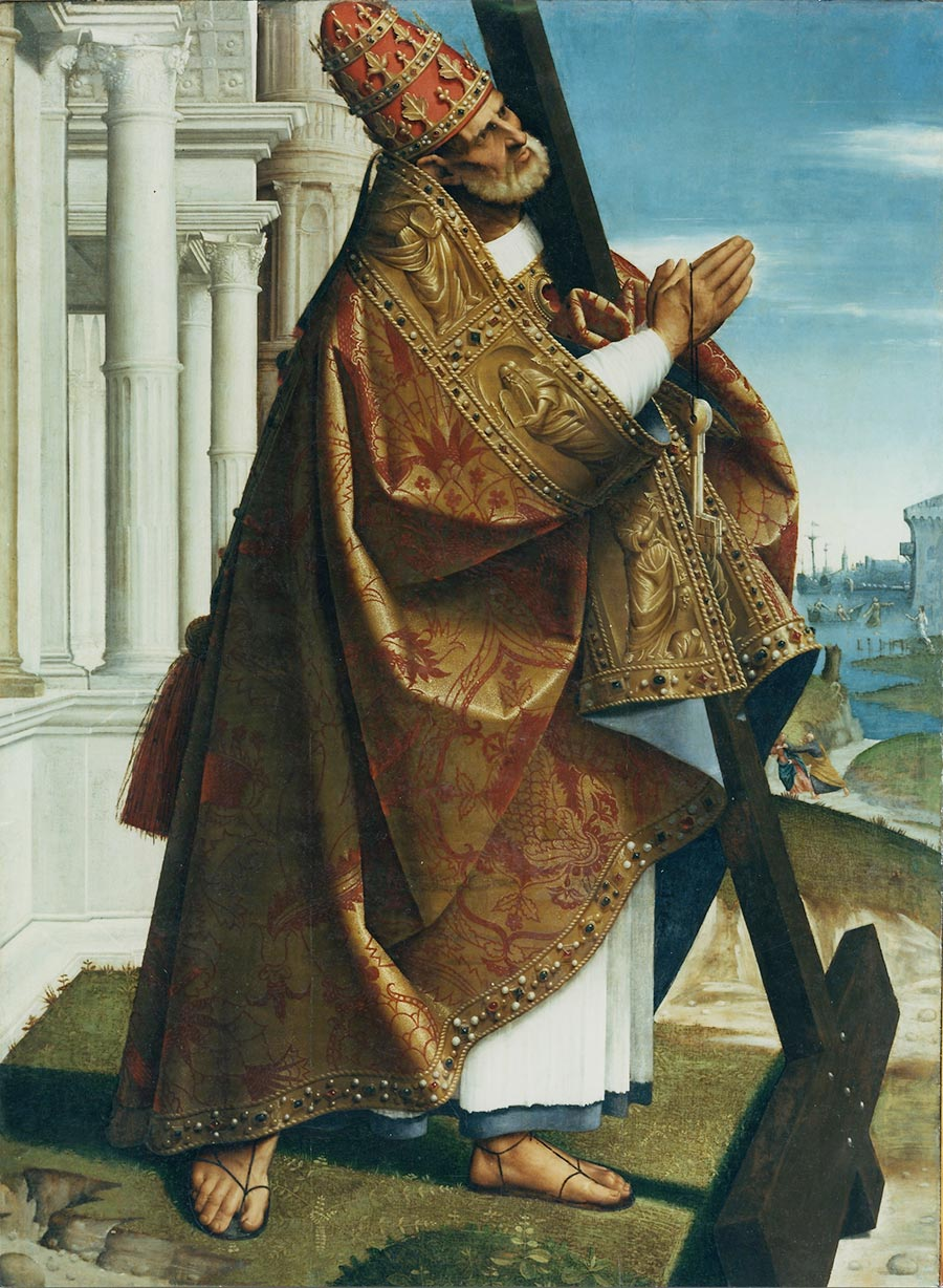 Museo regionale di messina, girolamo alibrandi, san pietro